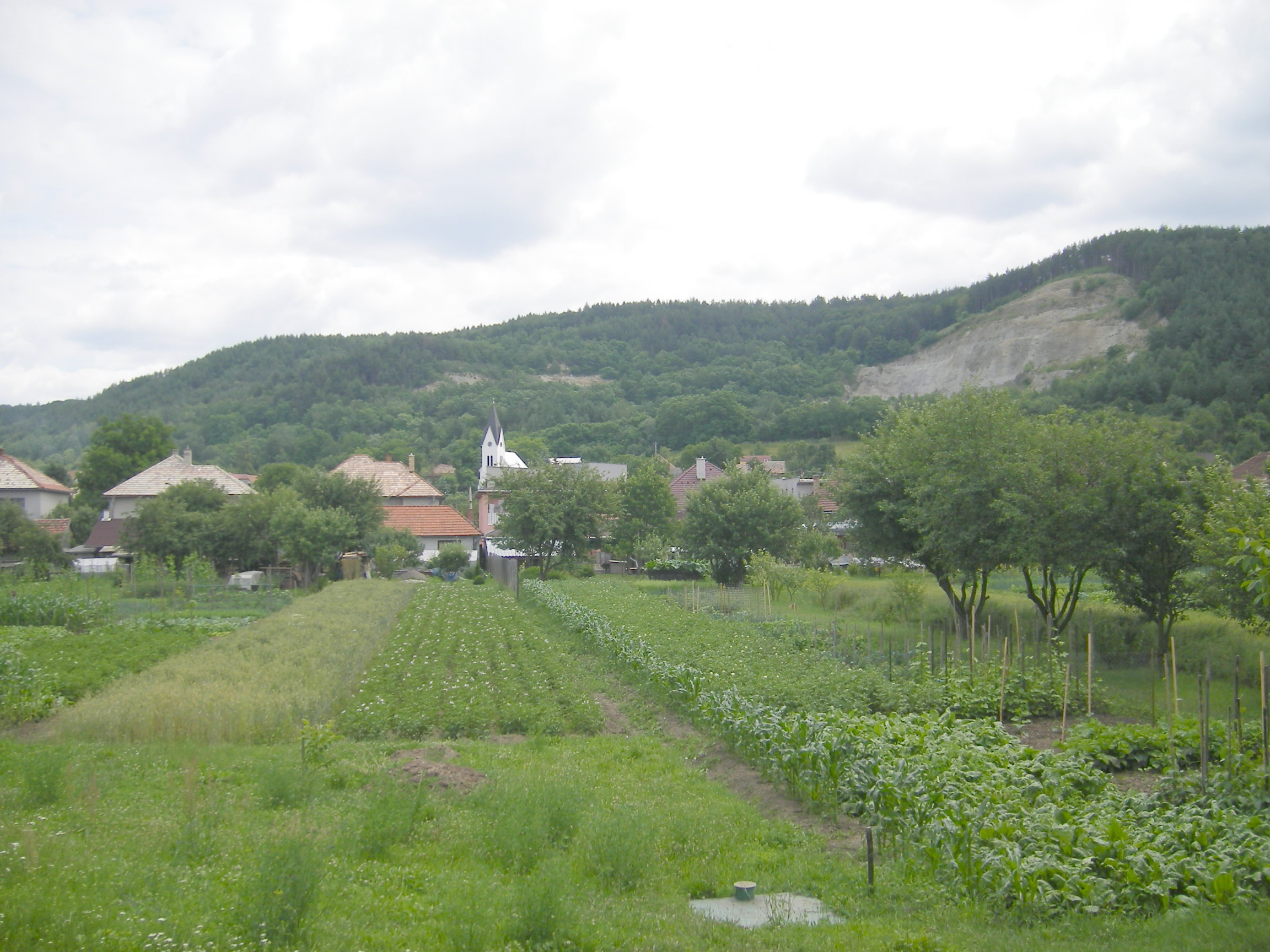 Lehôtka pod Brehmi (okres Žiar nad Hronom)